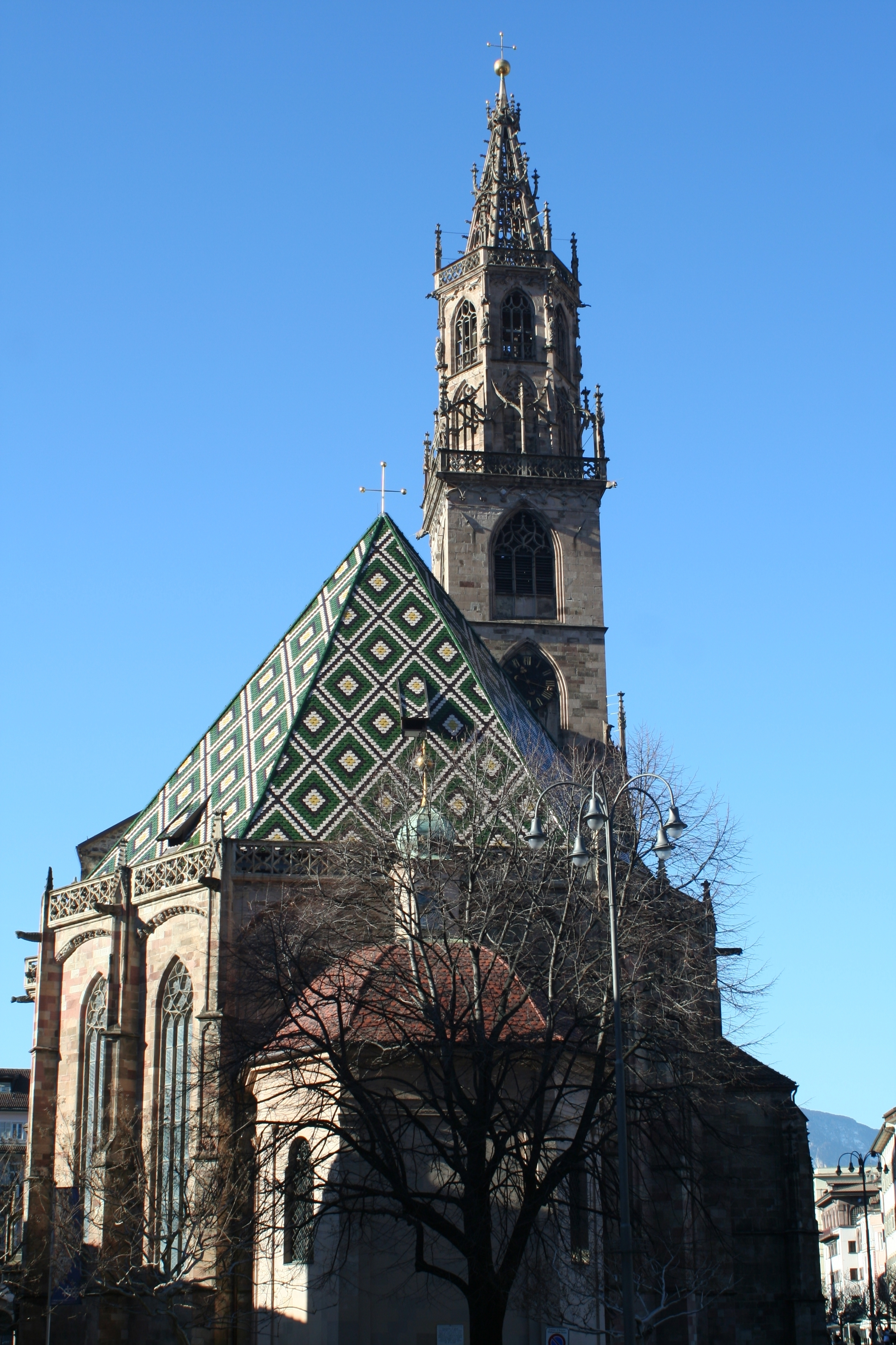 Dom Maria Himmelfahrt mit Kirchplatz